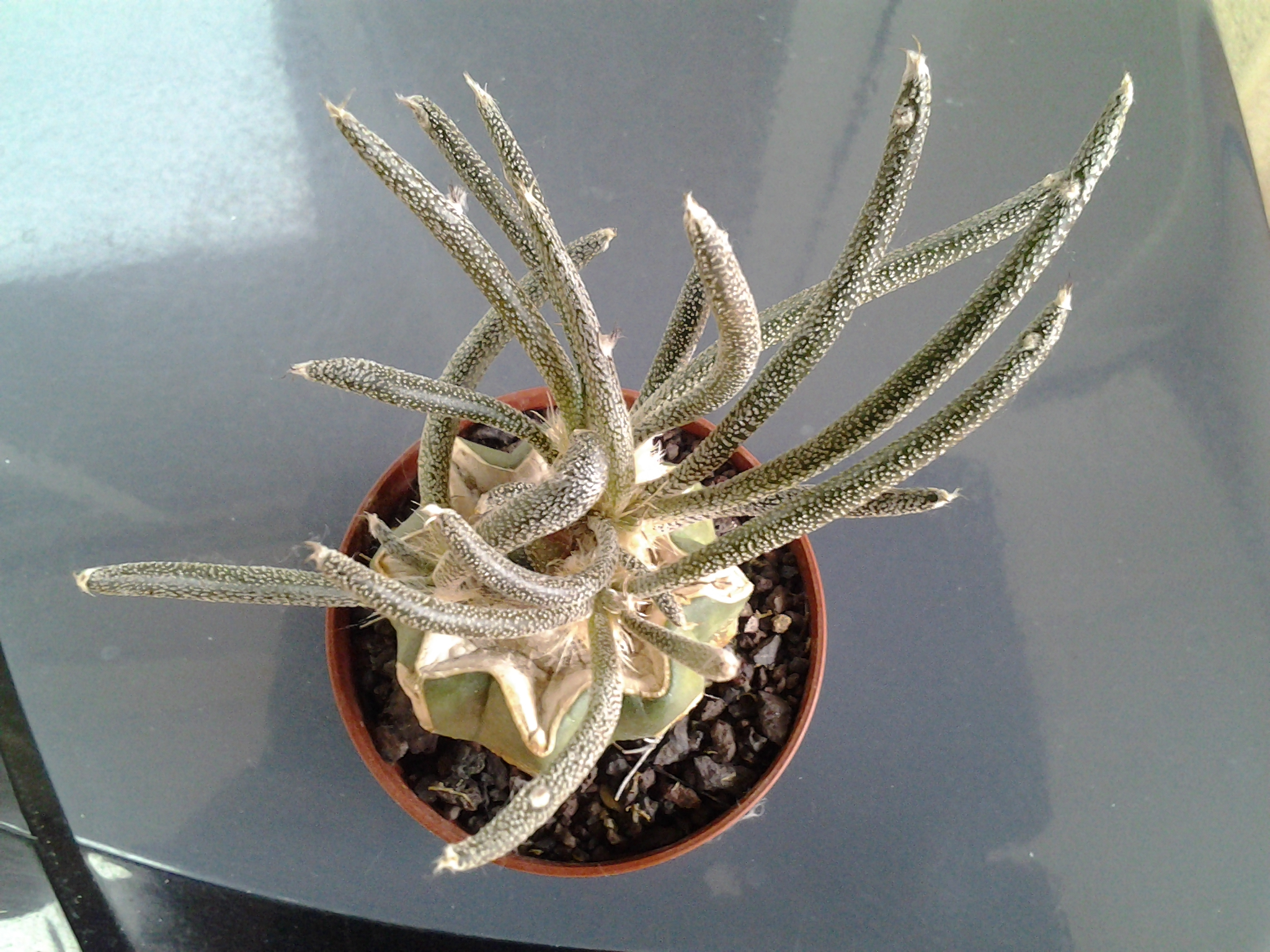 ACM Gréffé